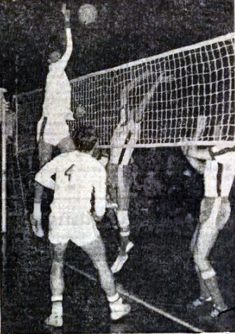 Siatkarze Czarnych Radom - sezon 1991/92